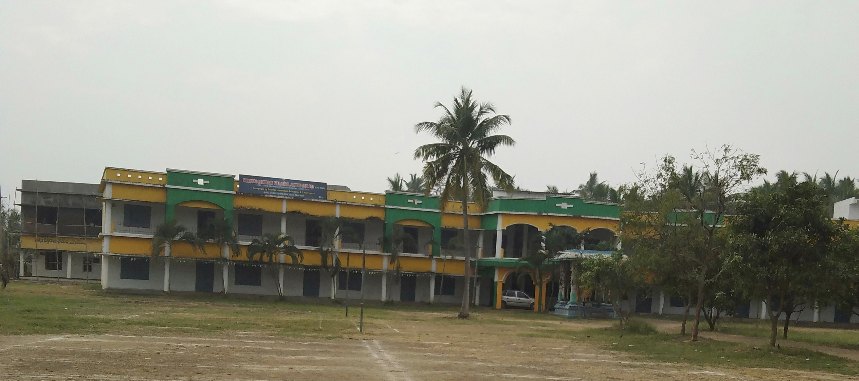 చిక్కం సత్తిరాజు మెమోరియల్ జూనియర్ ప్రైవేటు కళాశాల